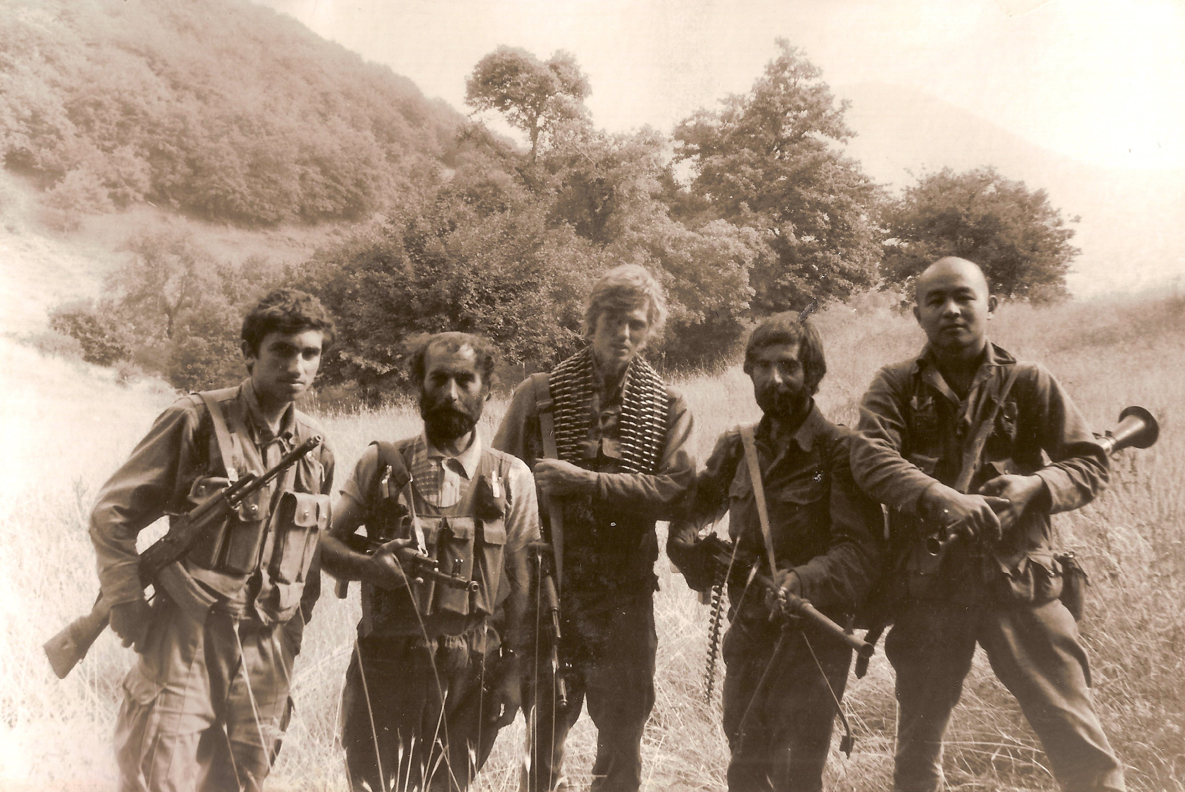 Un groupe du 8e compagnie d'infanterie de Stepanakert, Armée de défense de la République du Haut-Karabagh. District du corridor de Latchine aux alentours du village à la frontière avec Suarasy Fizouli.